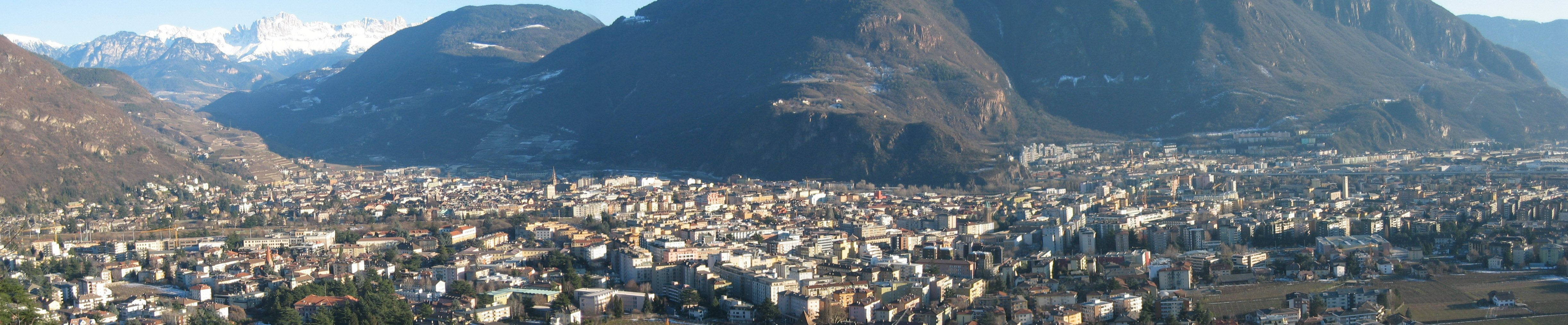 Bolzano